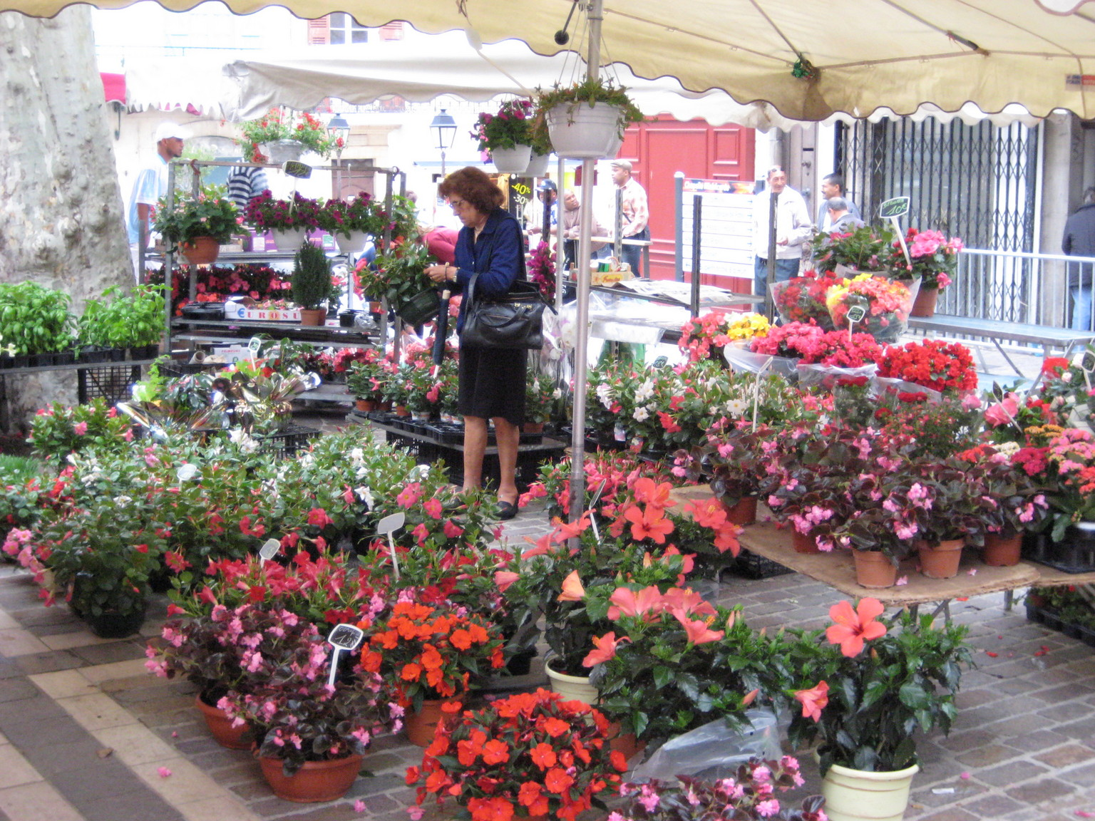 Vallauris-Blummemaart